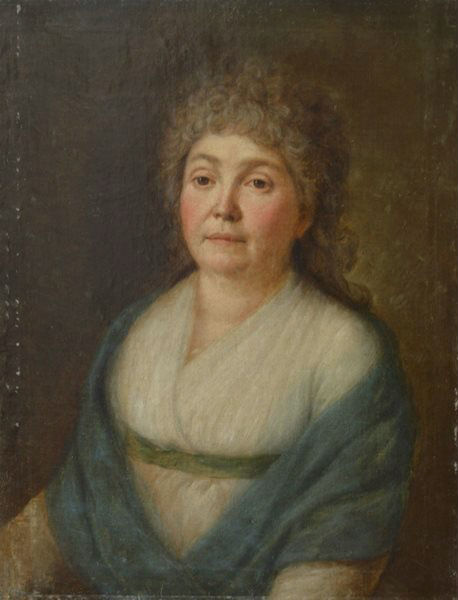 Княгиня Александра Александровна Долгорукова (1765—1809), ур. Коробовская.